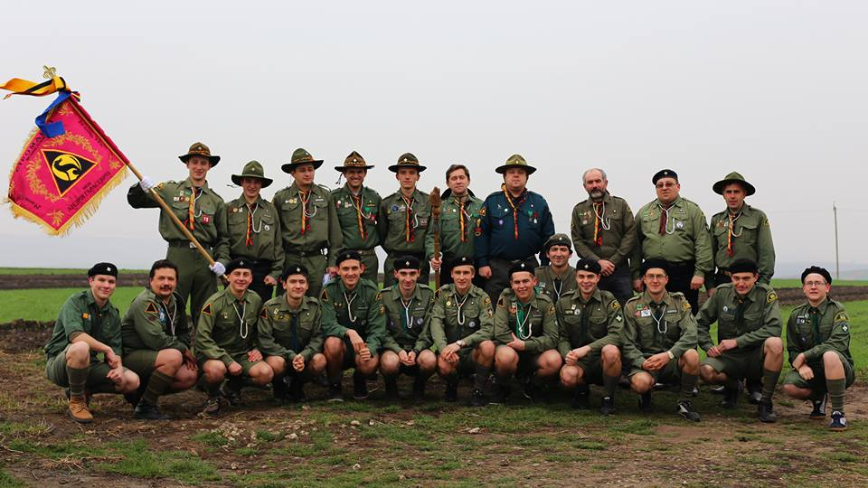 Мала рада 2013р.